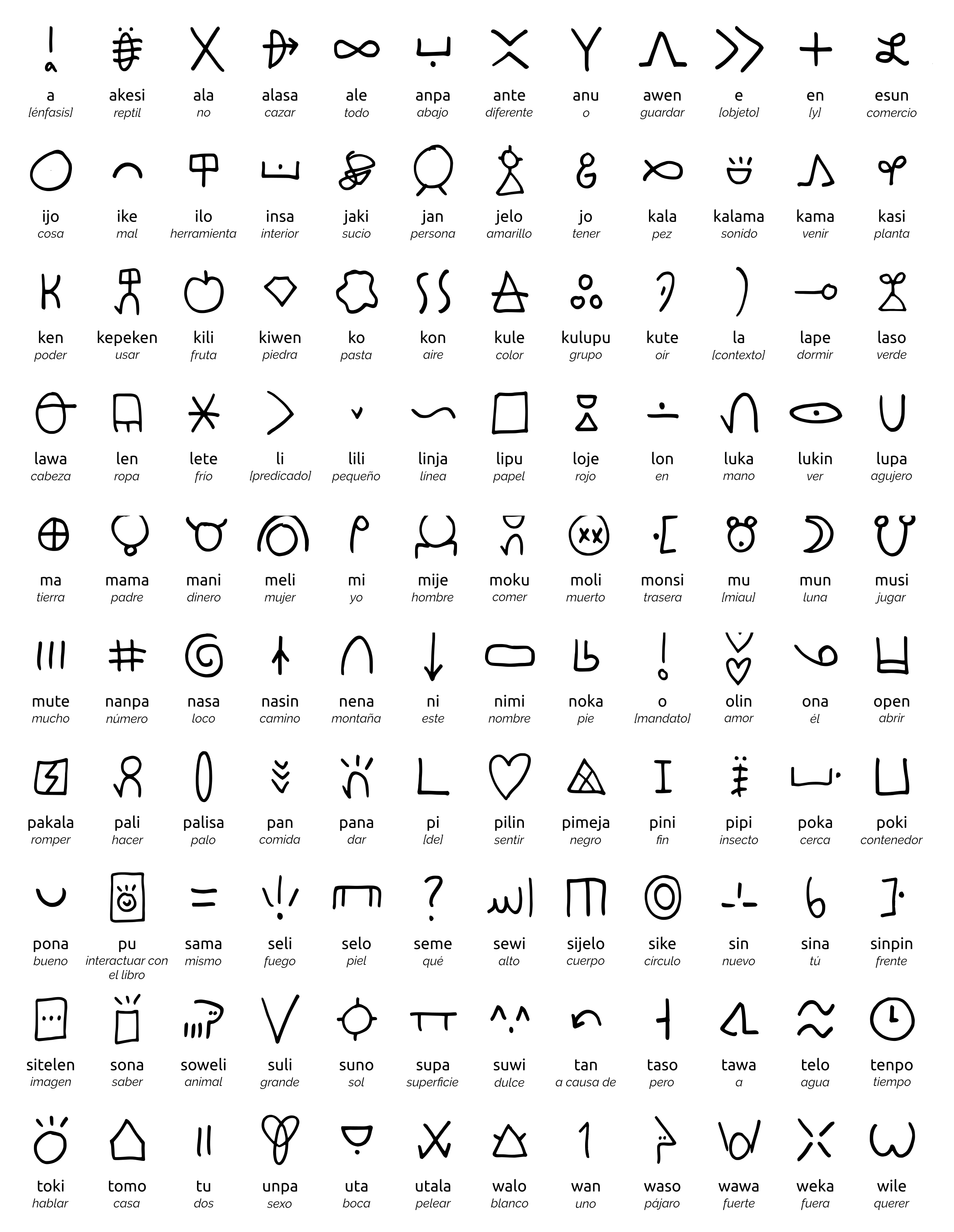 un sistema de escribir para toki pona por Sonja Lang con definiciones en español